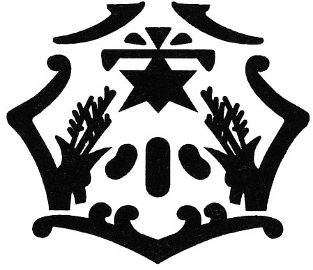 船橋市立八栄小学校・校章